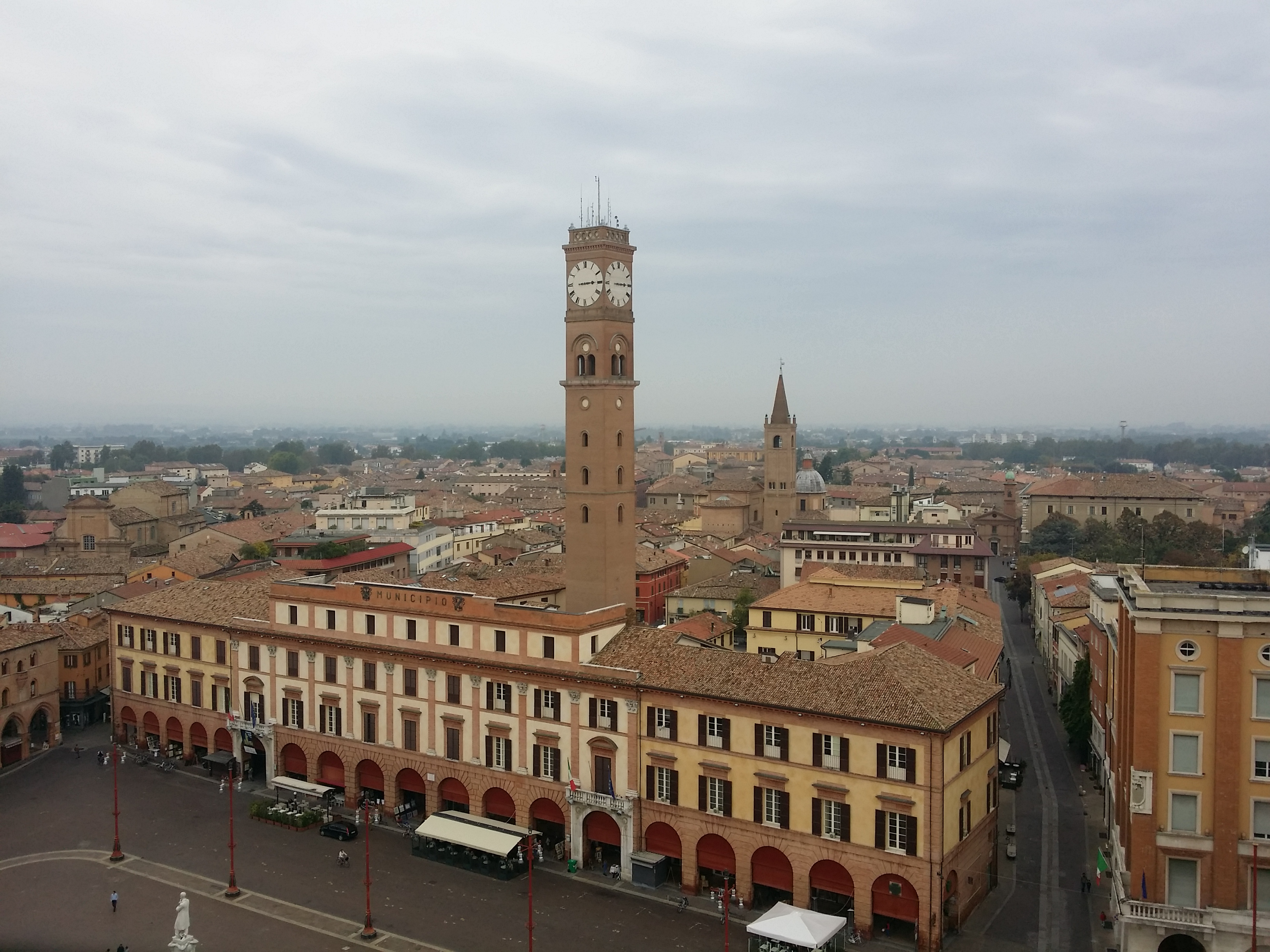 Palazzo Comunale This is a photo of a monument which is part of cultural heritage of Italy.